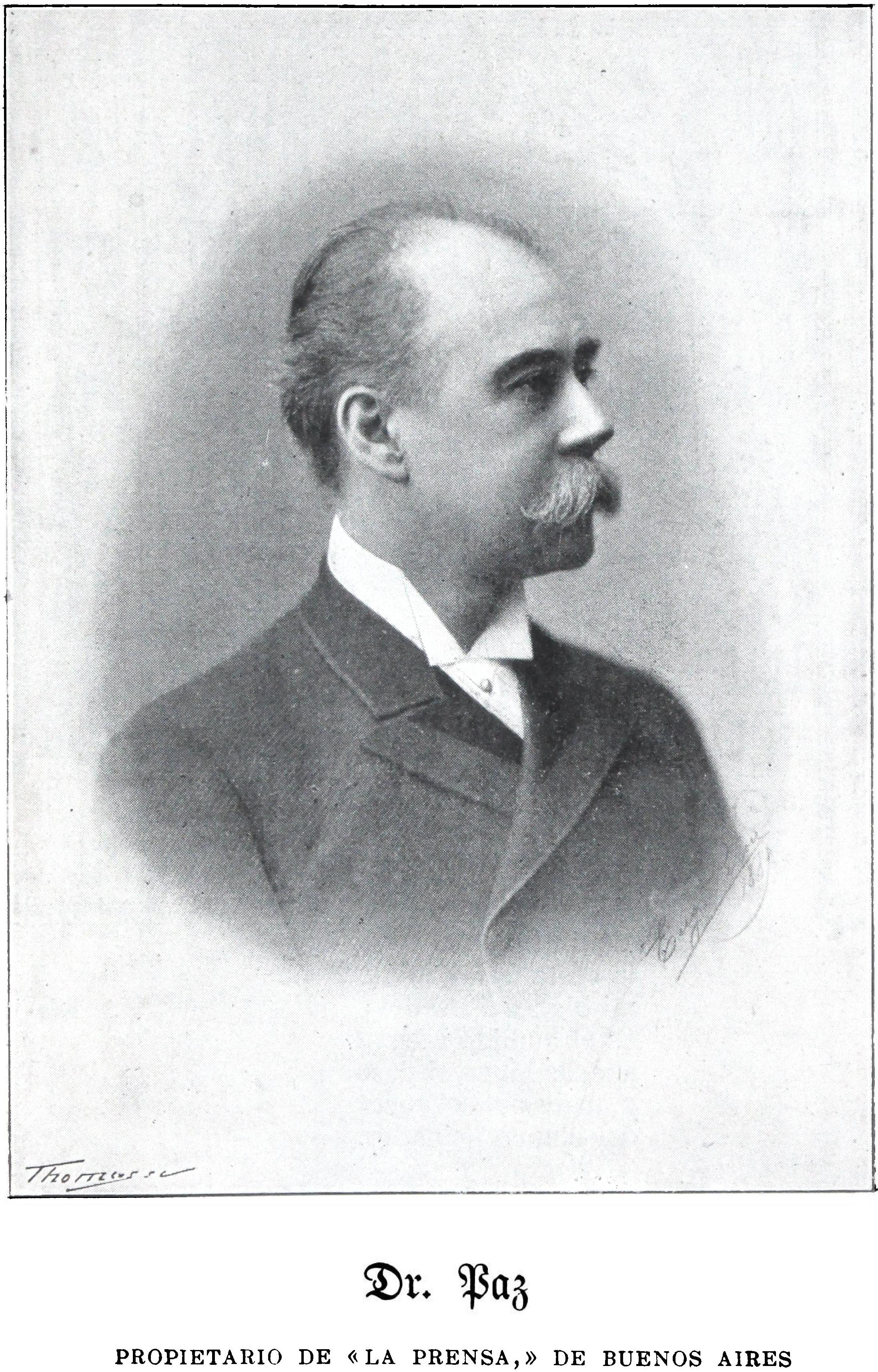 Almanaque Sud-Americano (1900)